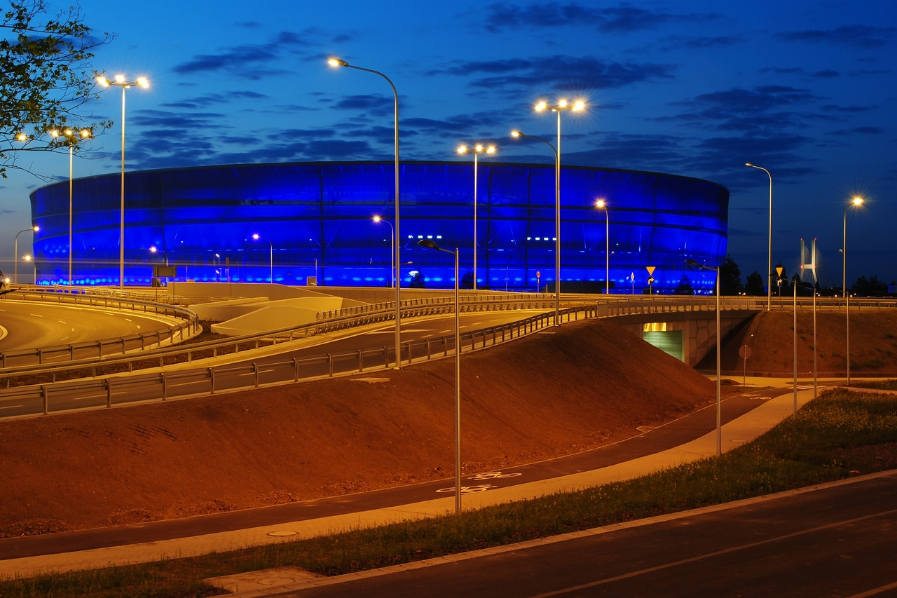 Stadion Miejski we Wroclawiu - testy iluminacj